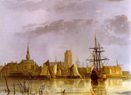 Left half detail